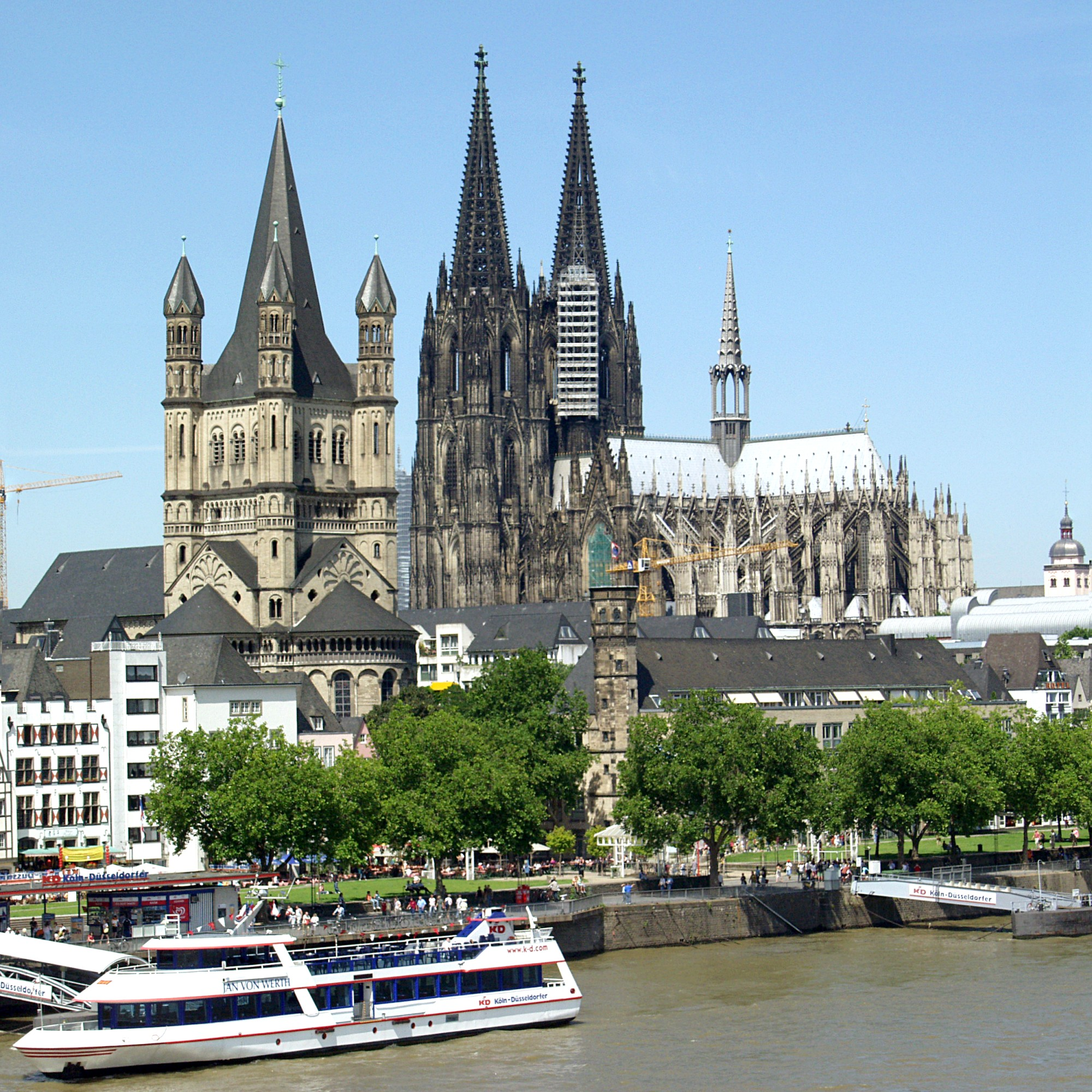 Groß St. Martin und Kölner Dom, im Vordergrund links das Passagierschiff „Jan van Werth“ der Köln-Düsseldorf und rechts das Stapelhaus.